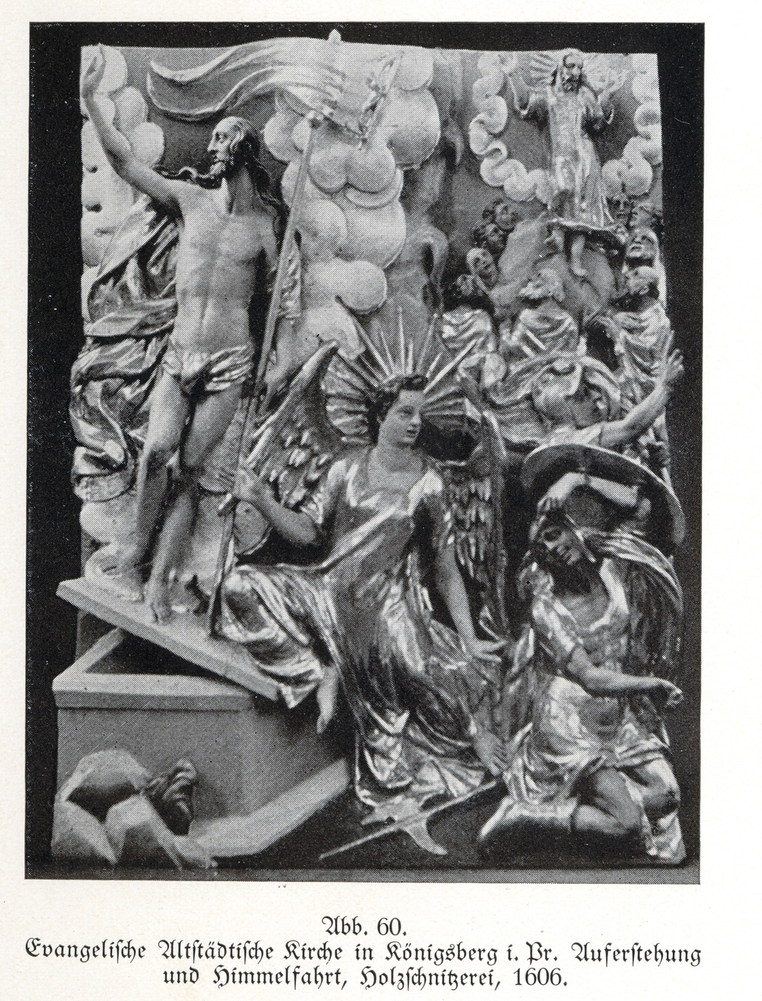 Königsberg, Evangelische Altstädtische Kirche, Auferstehung und Himmelfahrt, Holzschnitzerei, 1606